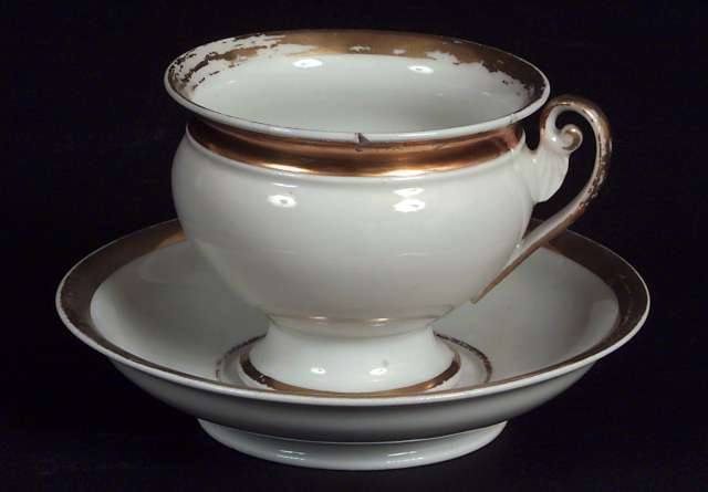 Sjokoladekopp med skål fra perioden 1820-1850. Høyde kopp 9 cm. Foto Anne-Lise Reinsfelt, Norsk Folkemuseum. NF.1961-0248AB.